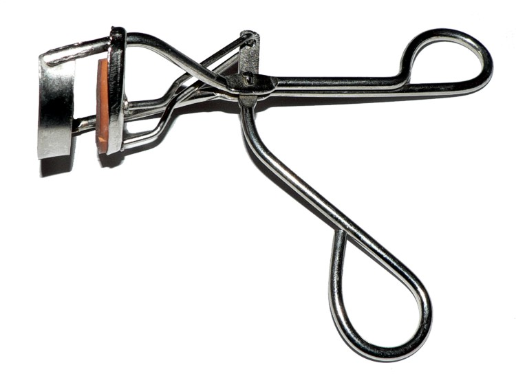 plier